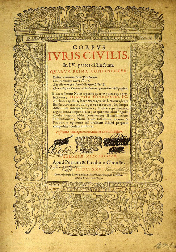 Corpus Iuris Civilis